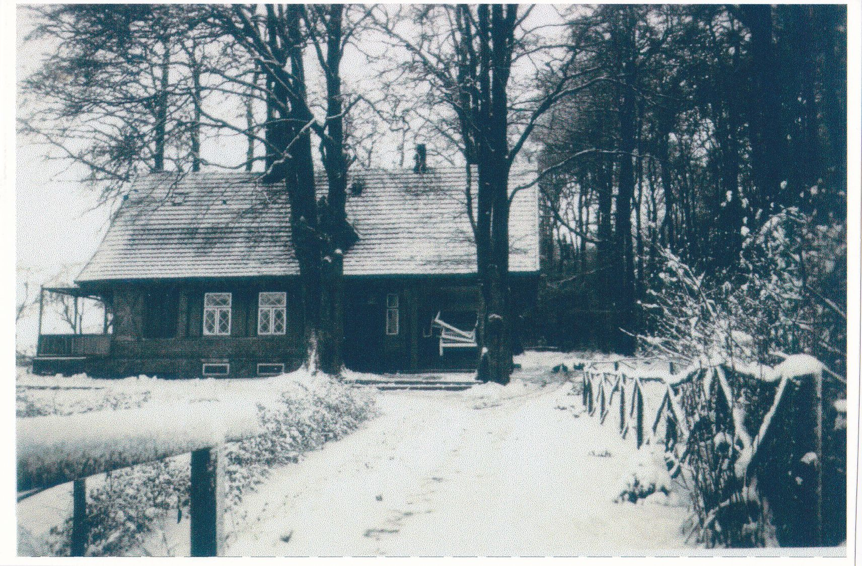 Parkwärterhaus auf der Halbinsel Buchholz bei Goldberg.